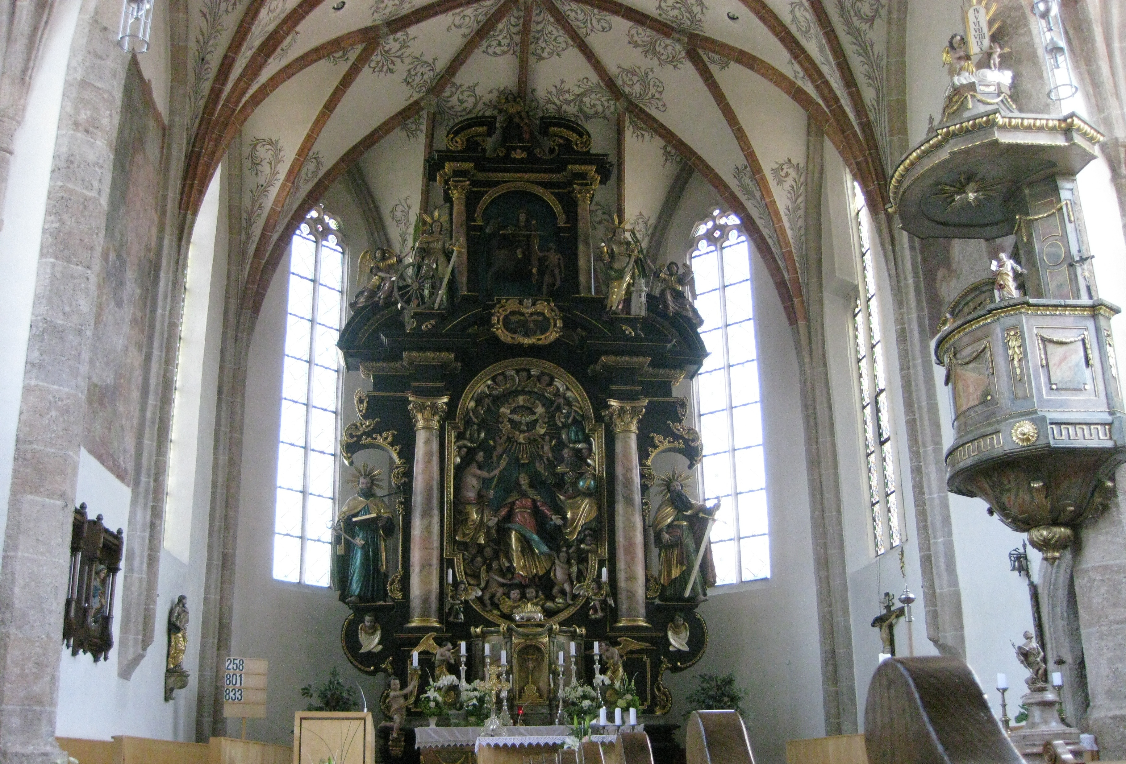 Hochaltar: Barock, 1688; Kanzel: klassizistisch, 19. Jh